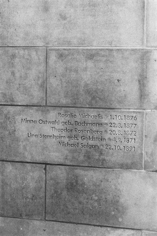 Namensnennung von Lina Sternheim, Frau des Adolf Sternheim, am Denkmal der Synagoge Lemgos